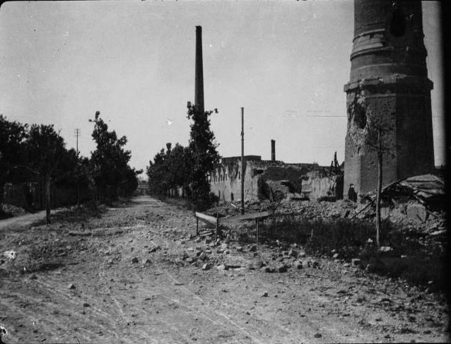 Reims : l'usine des Anglais, bd Saint-Marciaux (8 trous d'obus)